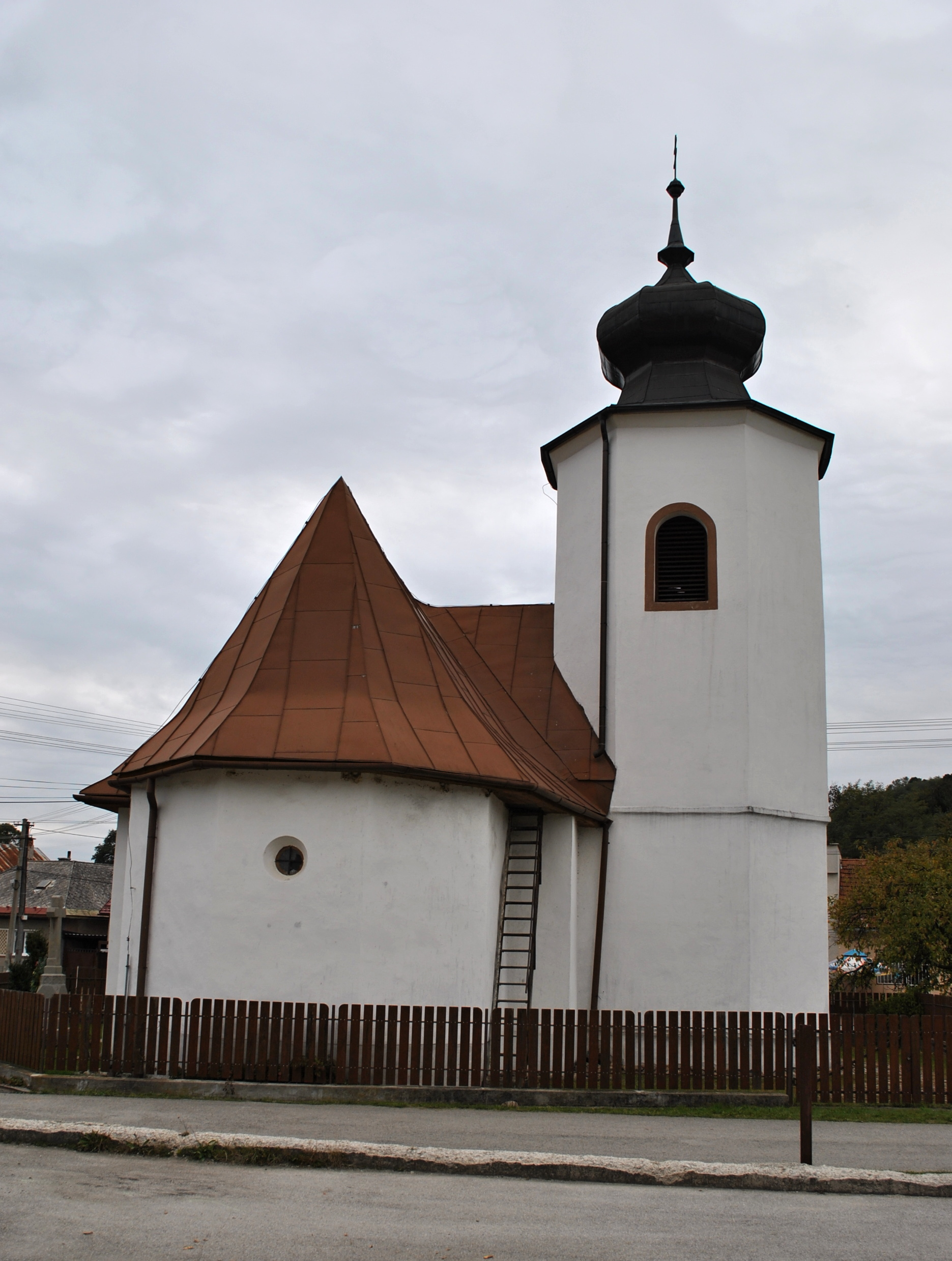 Kostol